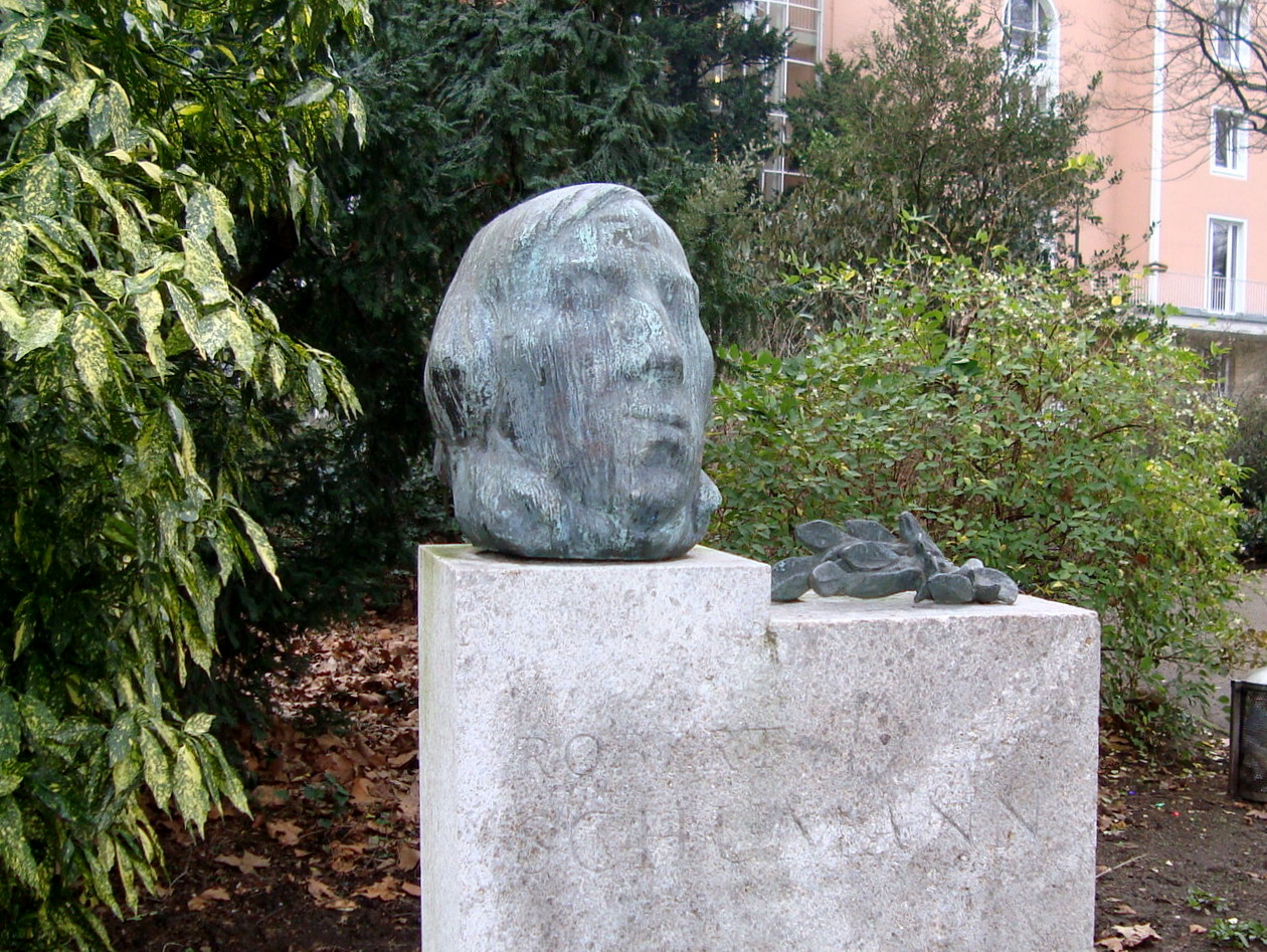 Karl Hartung: Denkmal Robert Schumanns